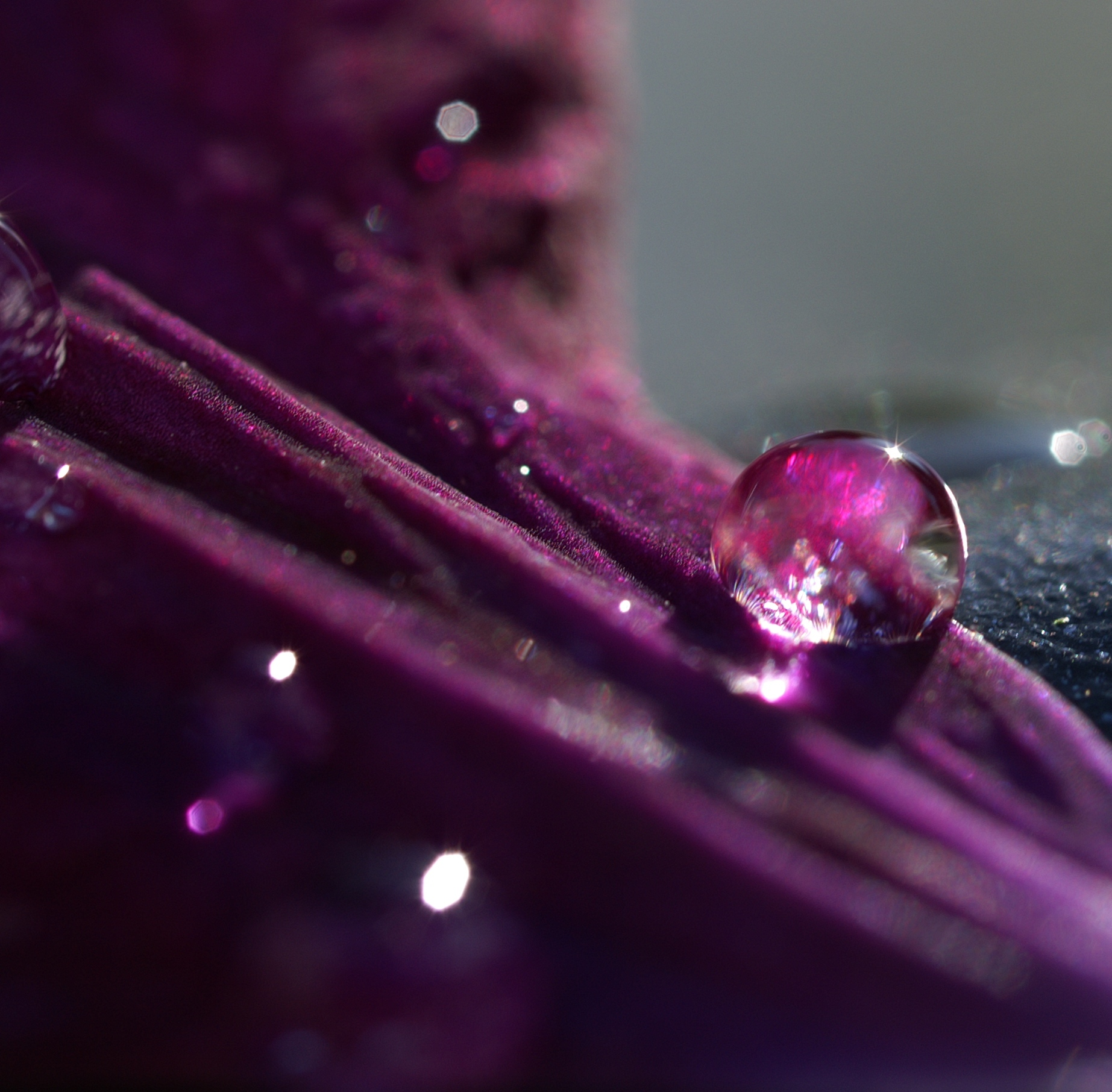 Tautropfen auf eine Blüte der Klematis The President, der Familie Ranunculaceae.